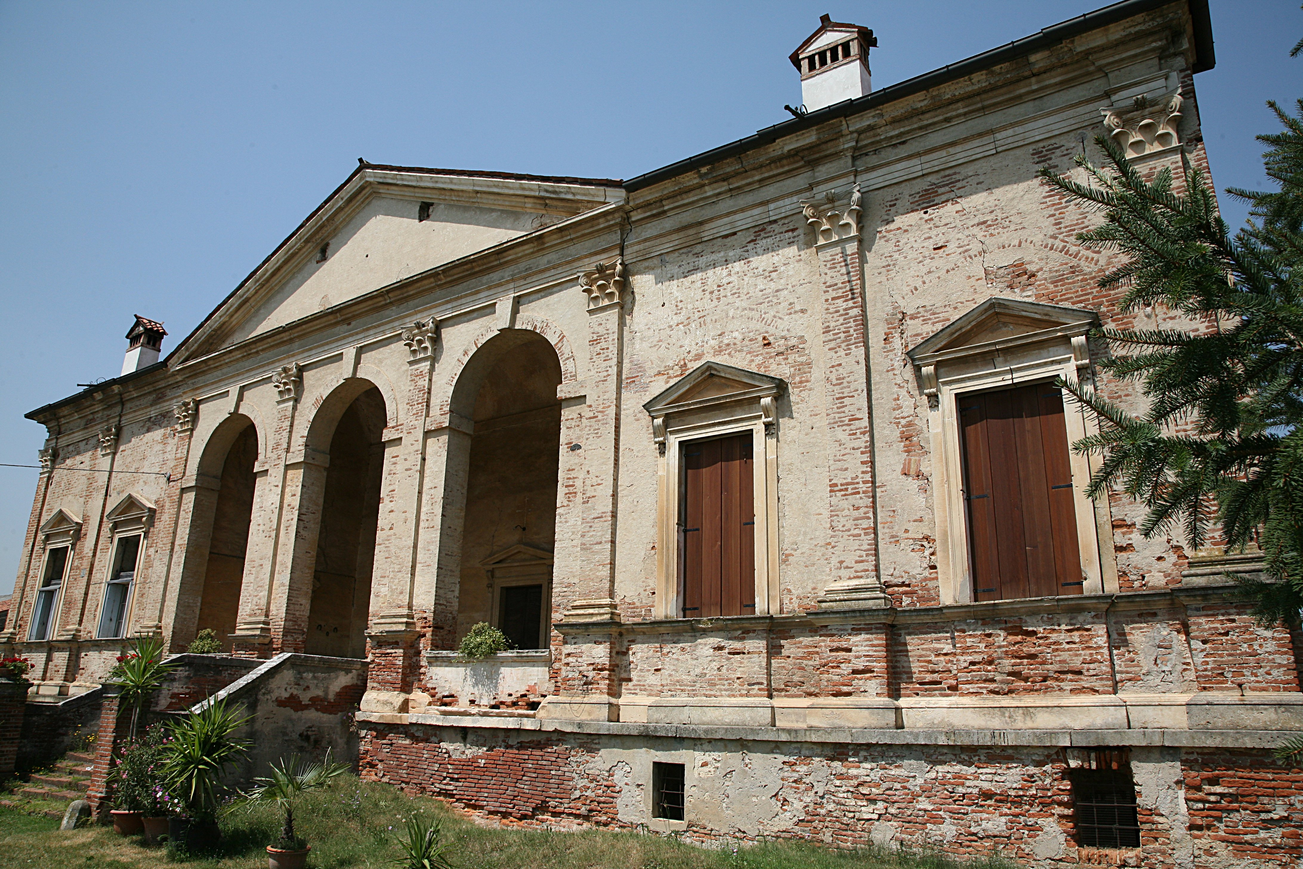 Villa Gazzotti in Bertesina near Vicenza by Andrea Palladio